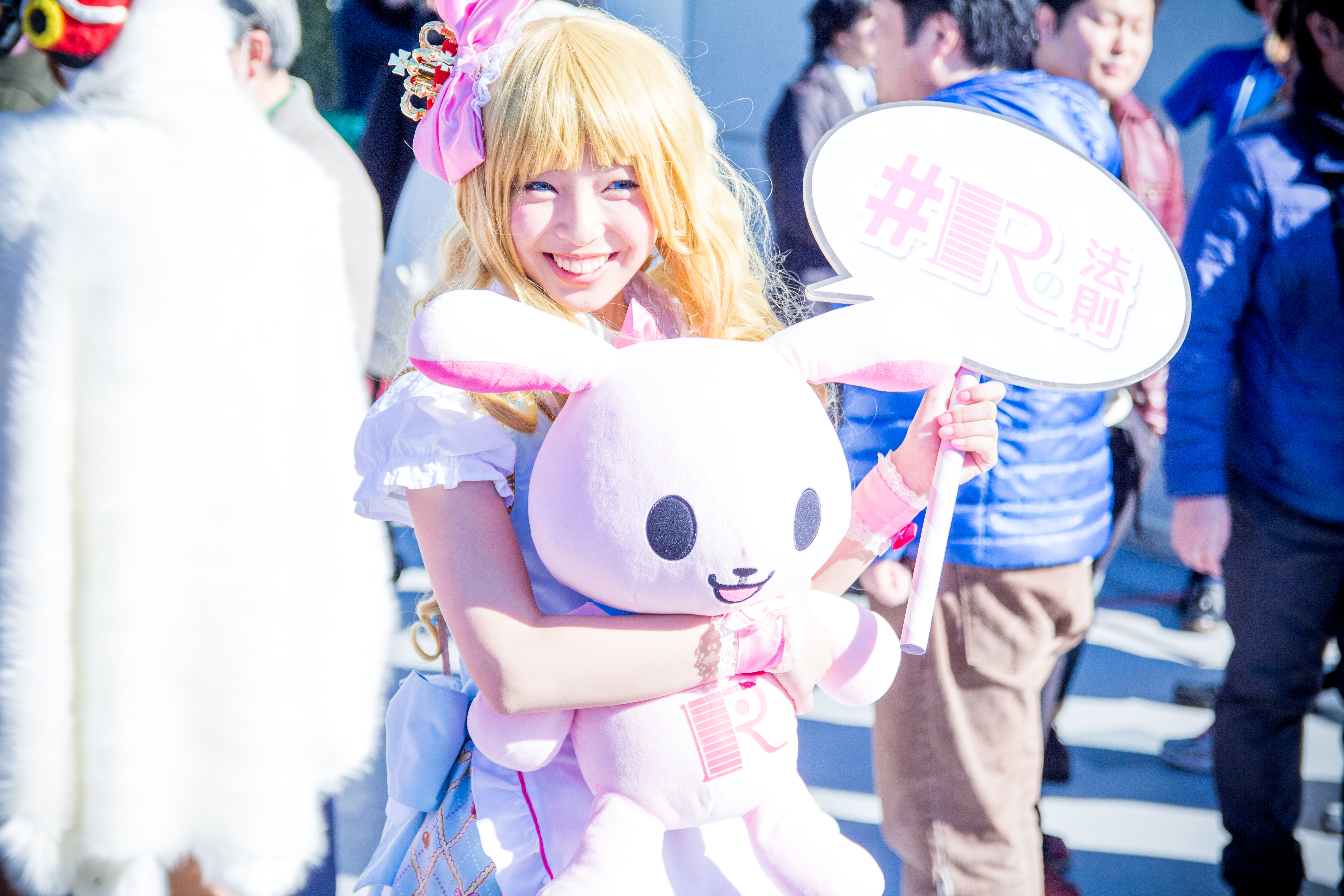 コミックマーケット91 2日目で撮影した、斎藤亜美